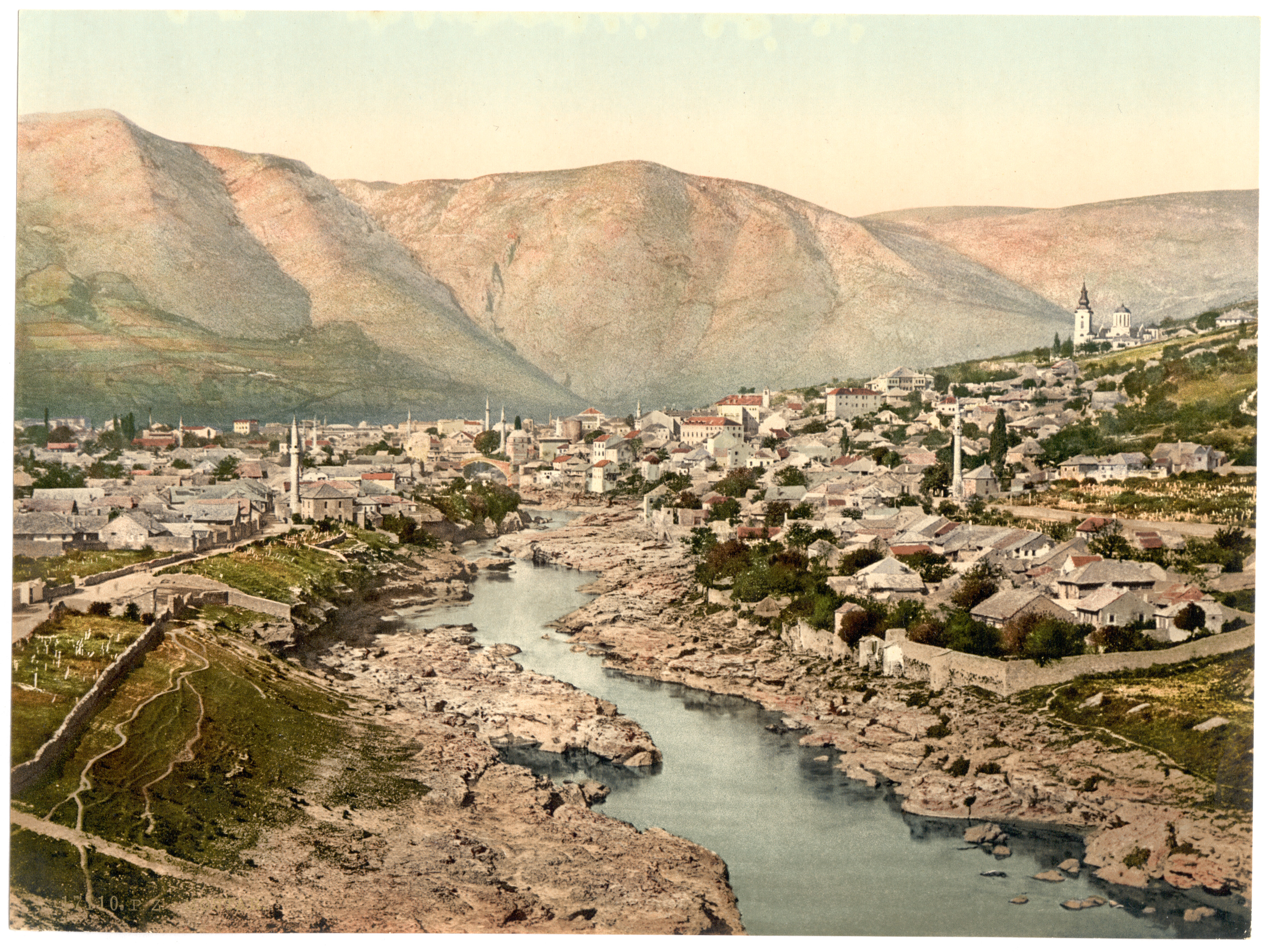 Kanjon rijeke Neretve iz Austro-ugarskog razdoblja